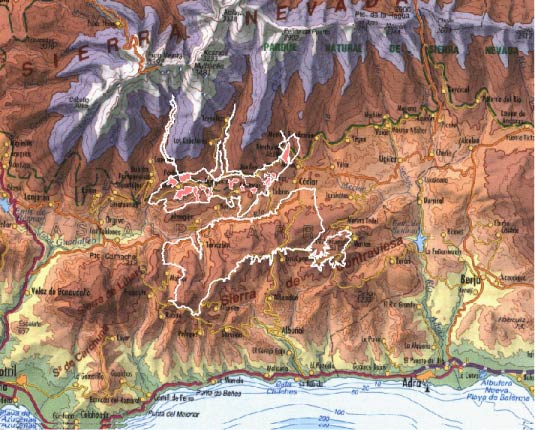 Plano Sitio Histórico Alpujarra